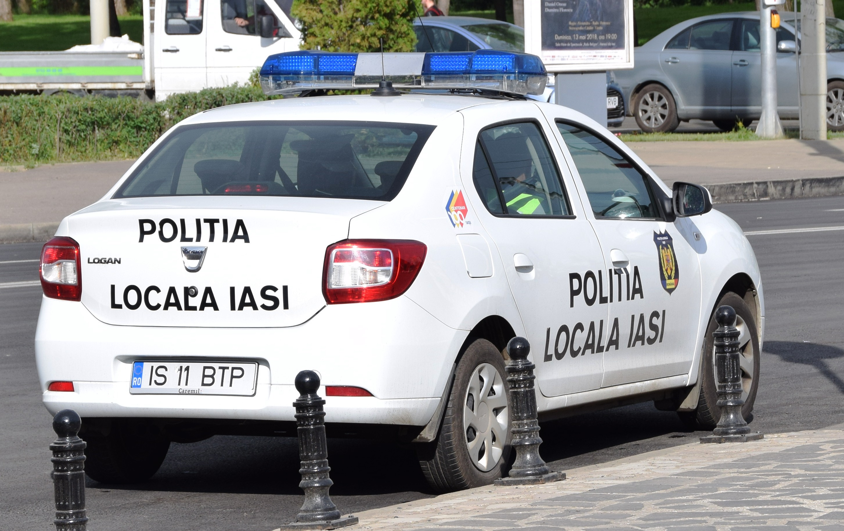 Iași politie auto